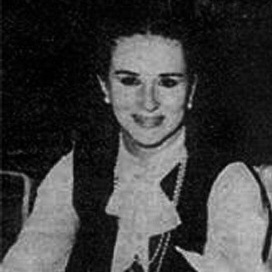 Claudia desarrolló su vida como una persona normal.